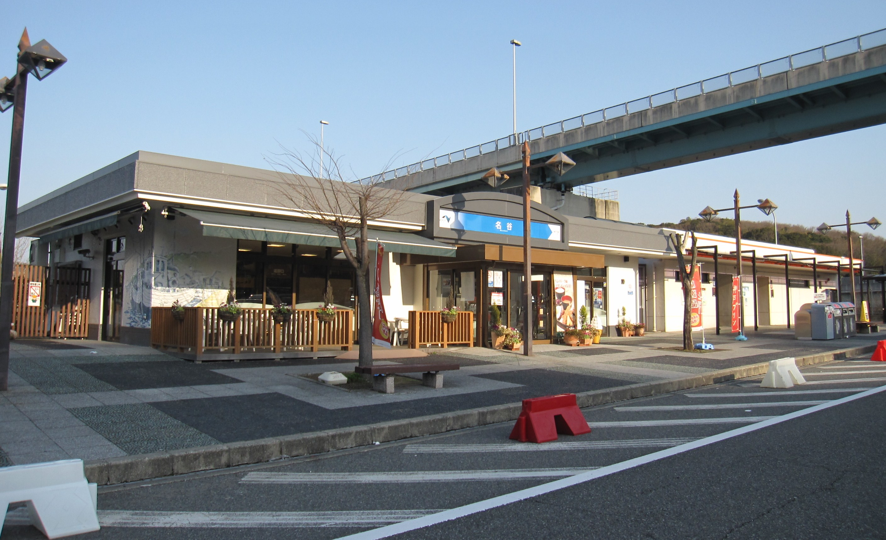 第二神明道路名谷PA